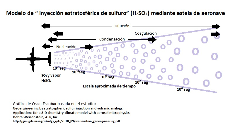 Gráfica de Oscar Escobar basada en el estudio: Geoengineering by stratospheric sulfur injection and volcanic analogs: Applications for a 3-D chemistry-climate model with aerosol microphysics Debra Weisenstein, AER, Inc.